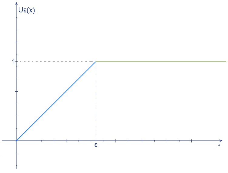 Gráfico da aproximação da função rampa via limites da função heaviside